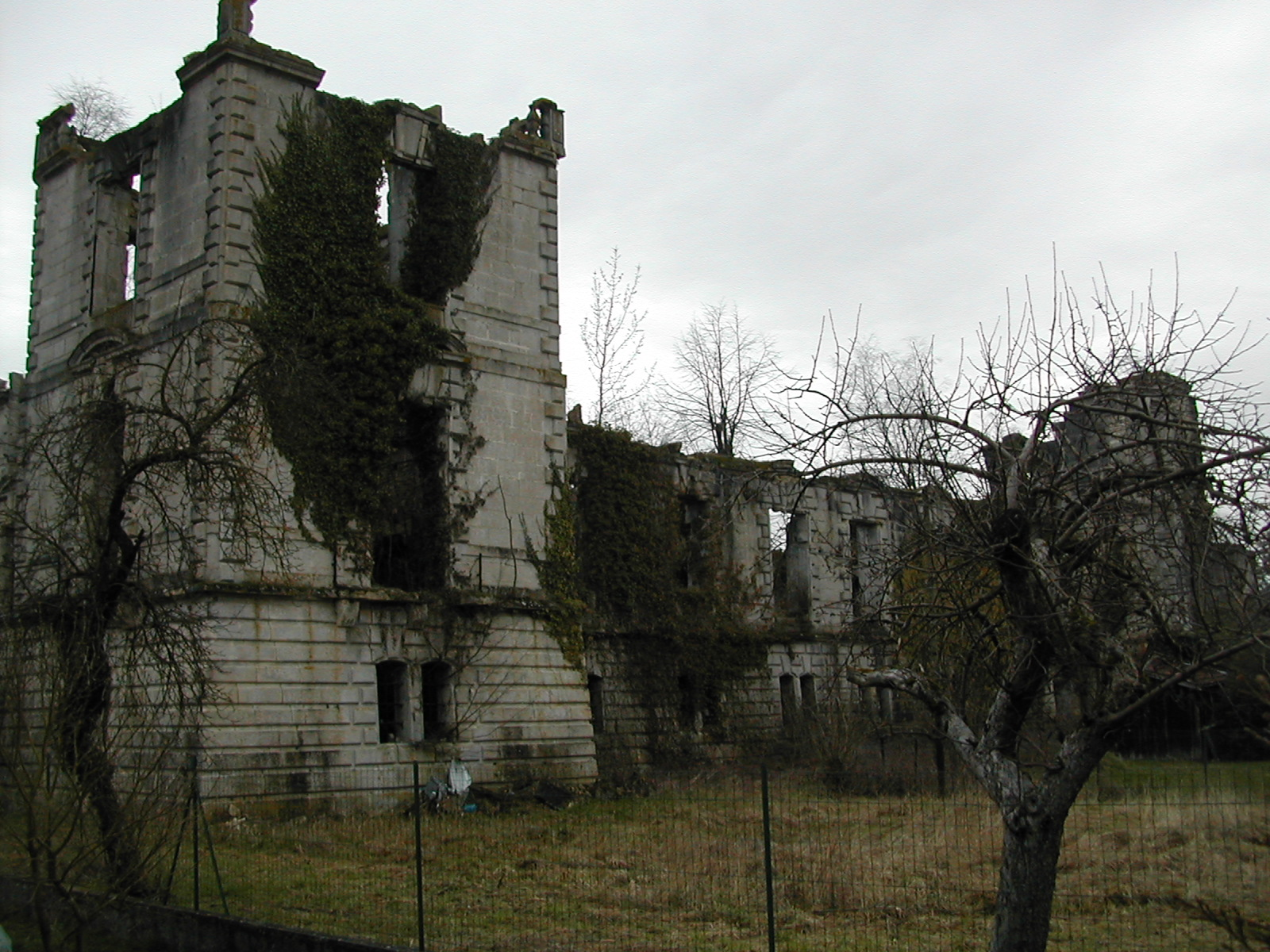 Château de Sampigny (aussi appelé Château de Henriette de Lorraine), situé sur la commune de Sampigny (Meuse, 55), inscrit (depuis le 8 décembre 1981) et classé (depuis le 8 juin 1989) sur la liste des Monuments Historiques de France (PA00106628).